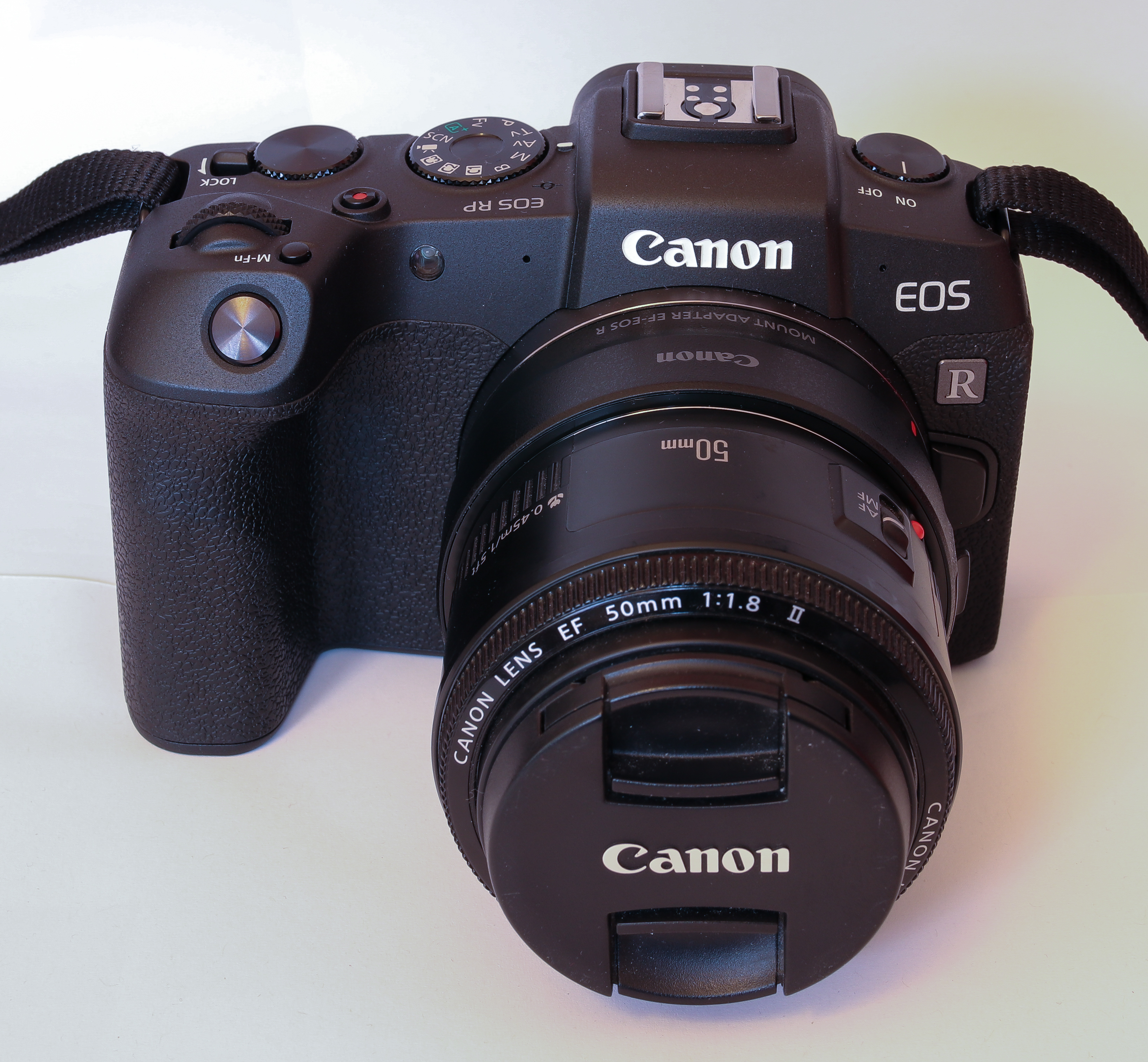 Die Canon EOS RP mit dem Adapter EF-EOS R und dem Objektiv EF 50 mm F1.8